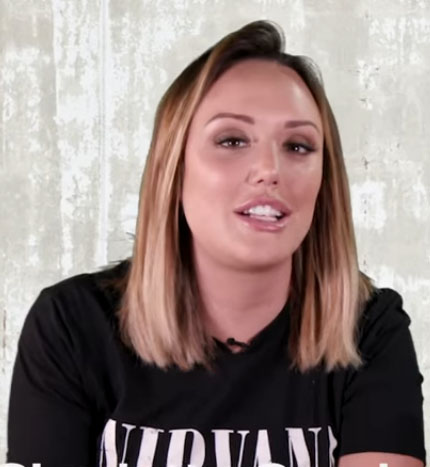 Charlotte Crosby en una entrevista